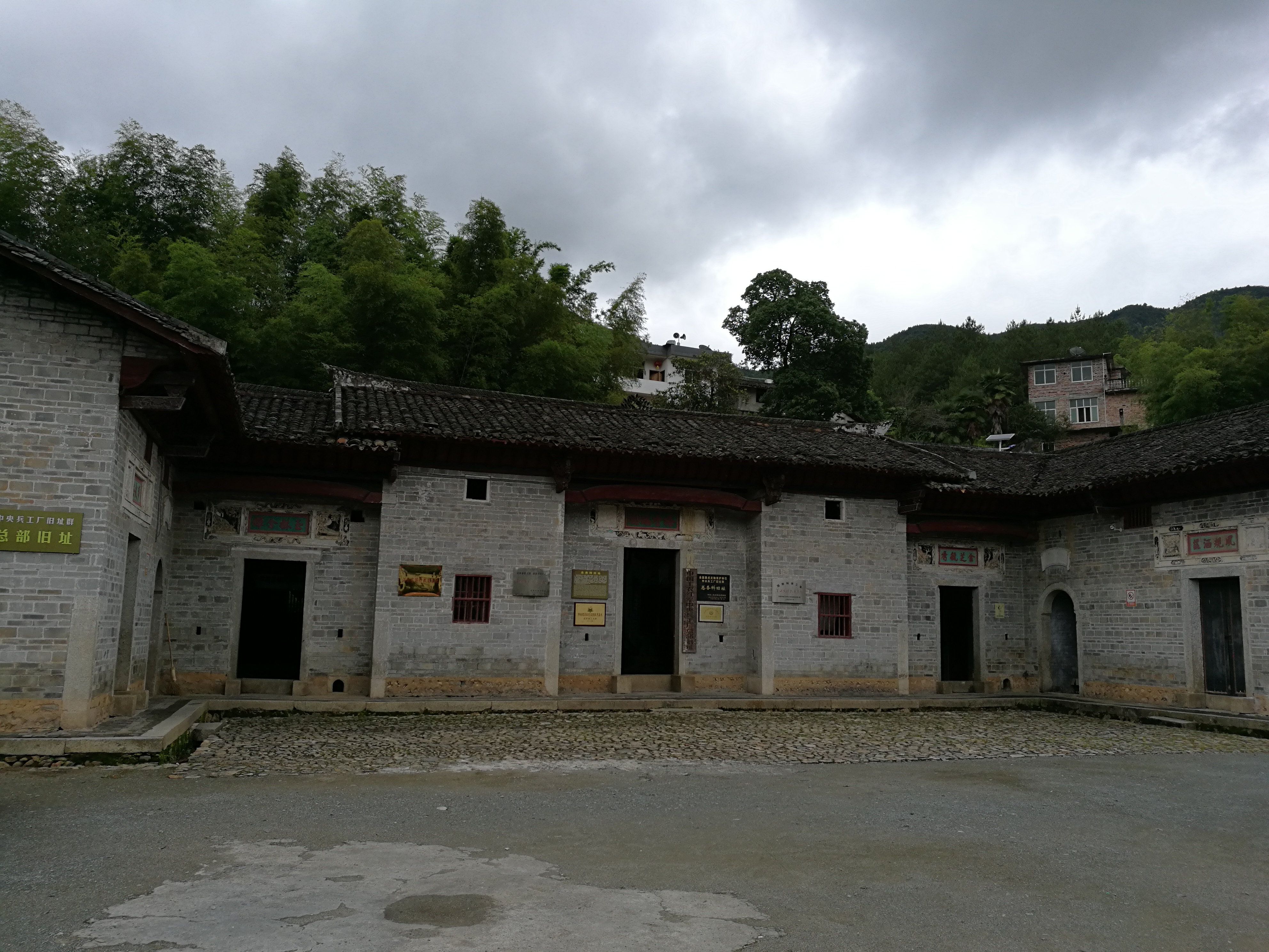 中央兵工厂旧址群—总务科旧址。